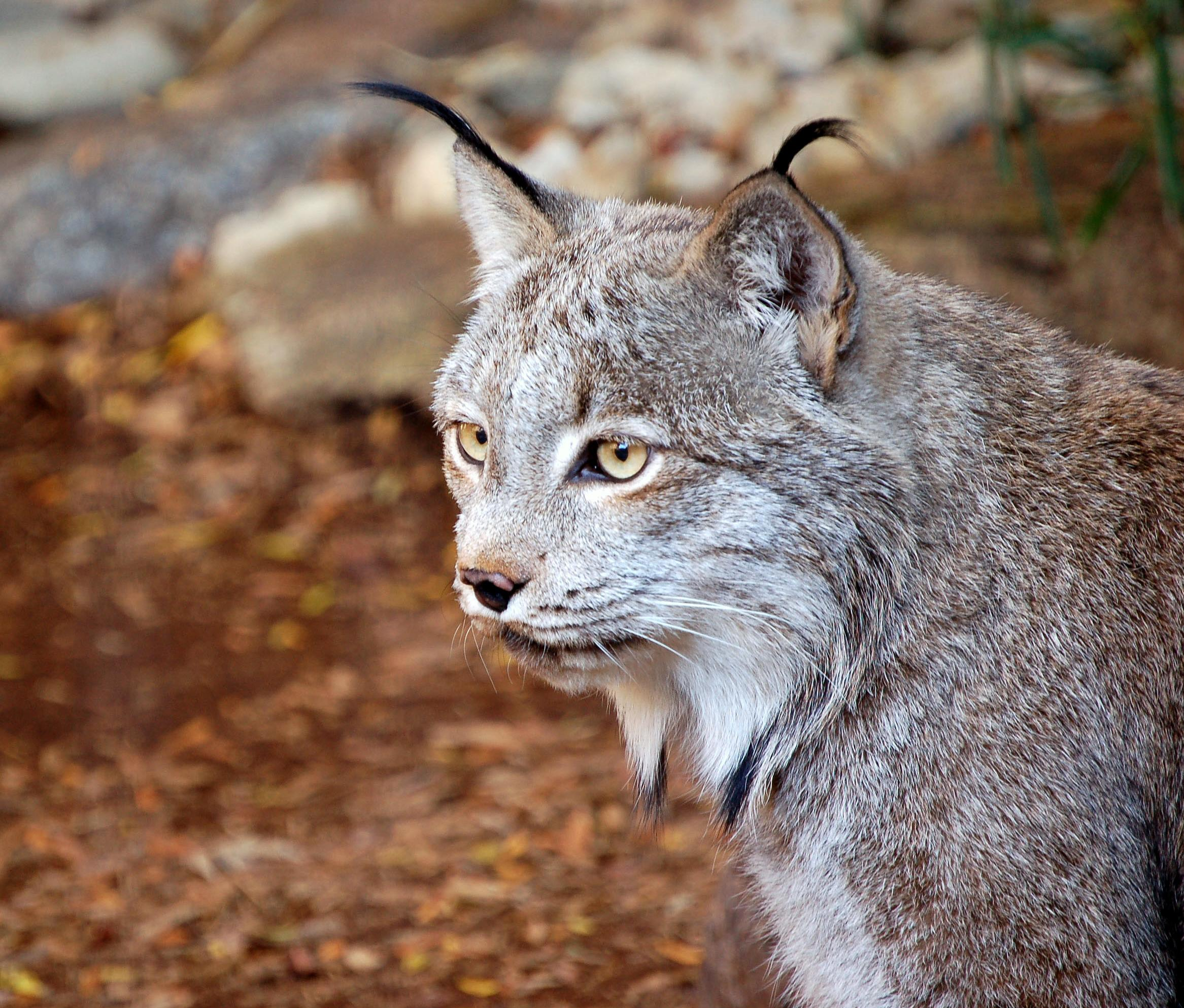 Canadian Lynx Lynx canadensis, Philadelphia zoo.